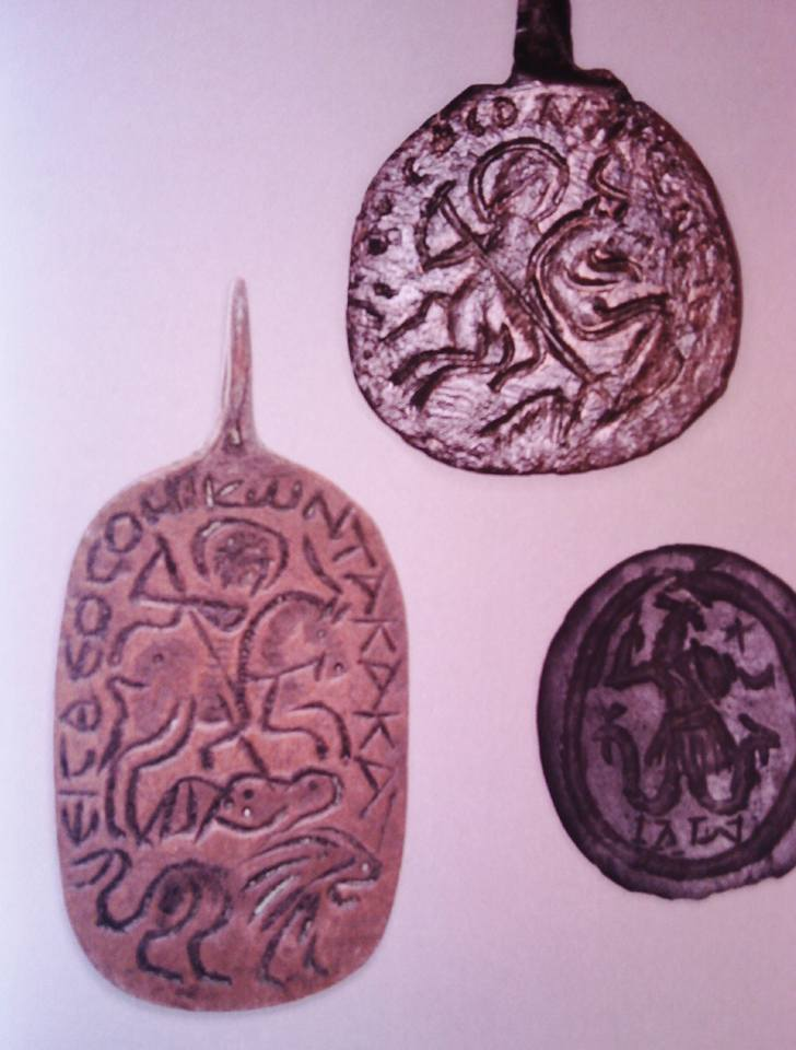 Deux pendentifs-amulettes juifs ; terre-cuite (Mésopotamie) et alliage de cuivre (Empire Romain d'Orient) ; Ve-VIe siècle